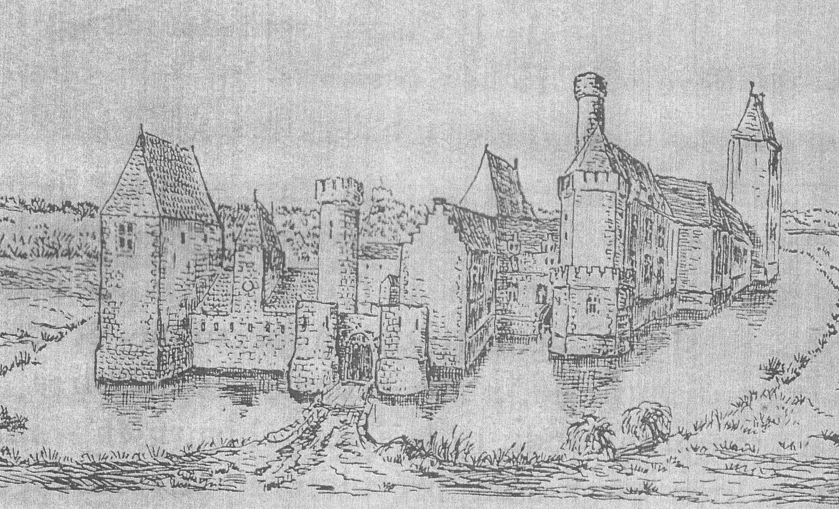 Château d'Havré (fin XVIème)